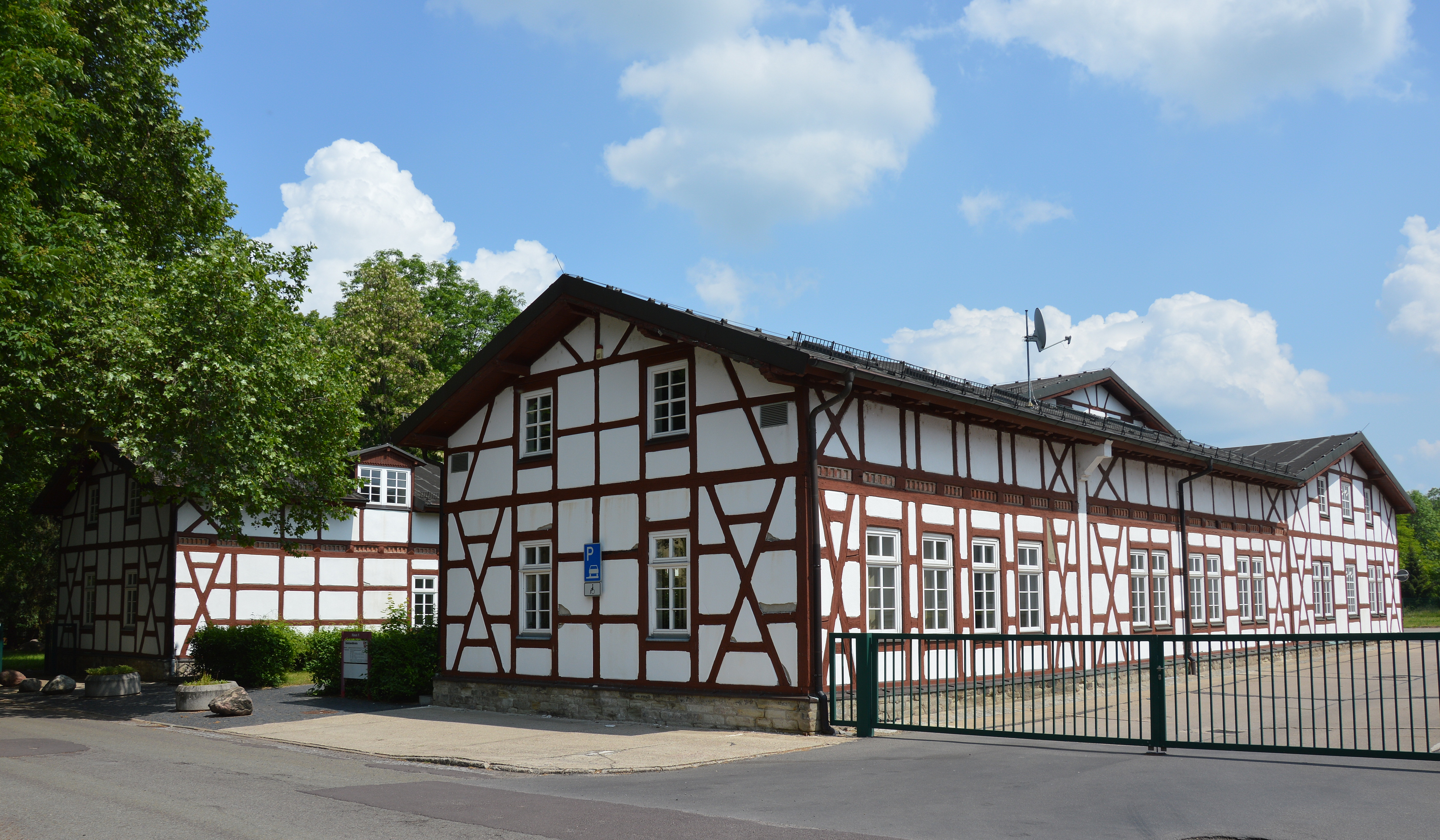 Cokturhof